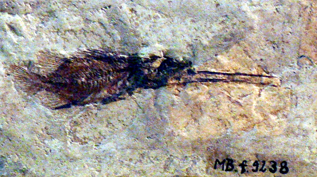 Ichthyotringa damoni DAVIS, (Syn. Rhinellus damoni) Cretaceous, Sahel ALma, Libanon